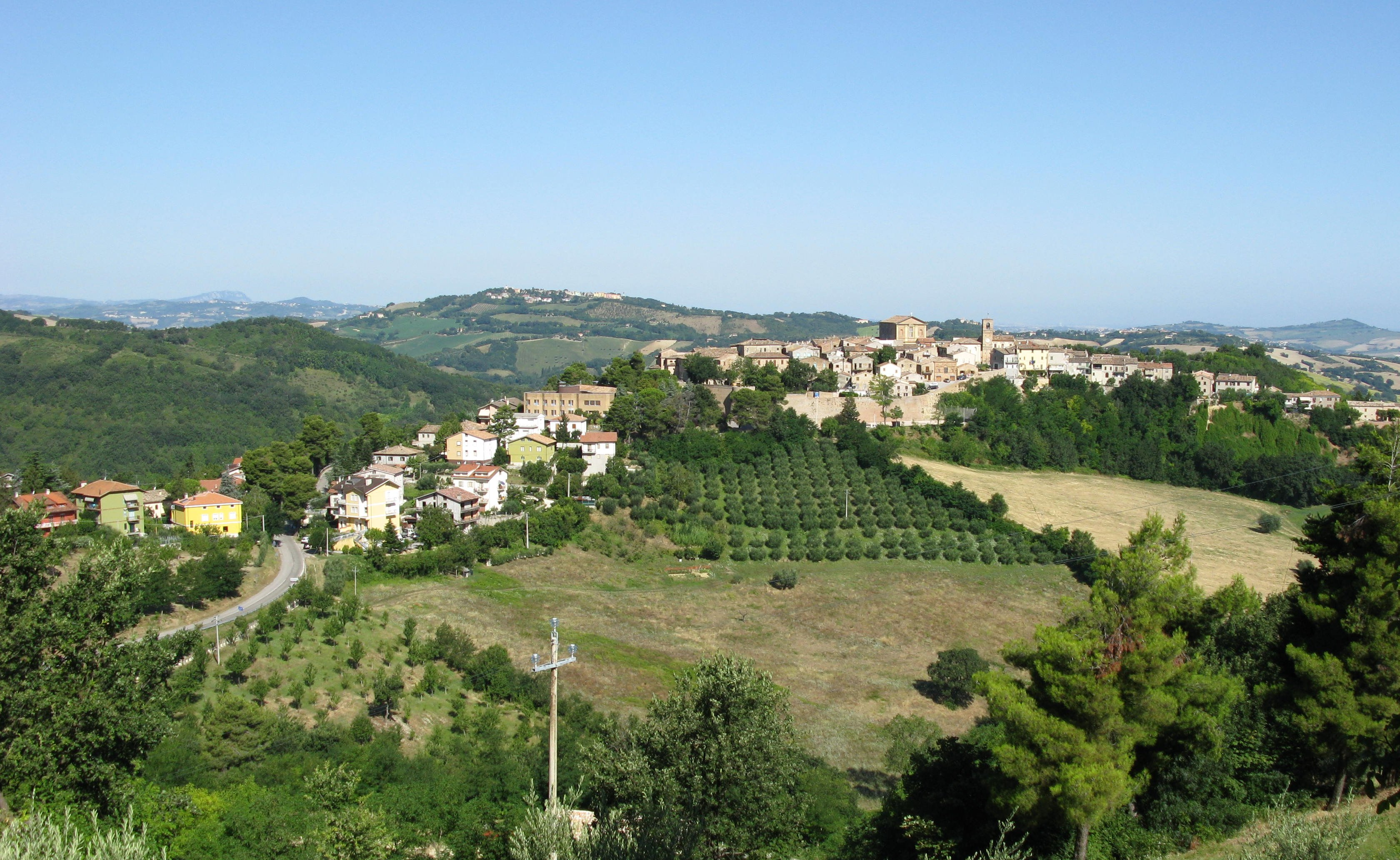 Panorama di Mombaroccio.